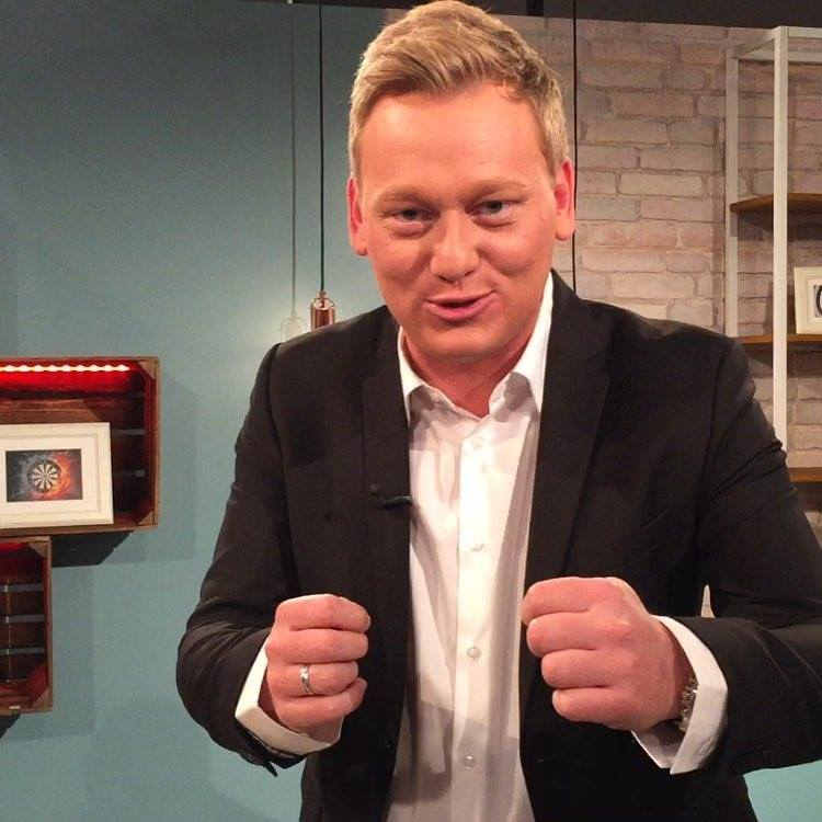 Jens Knossalla bei Sport1